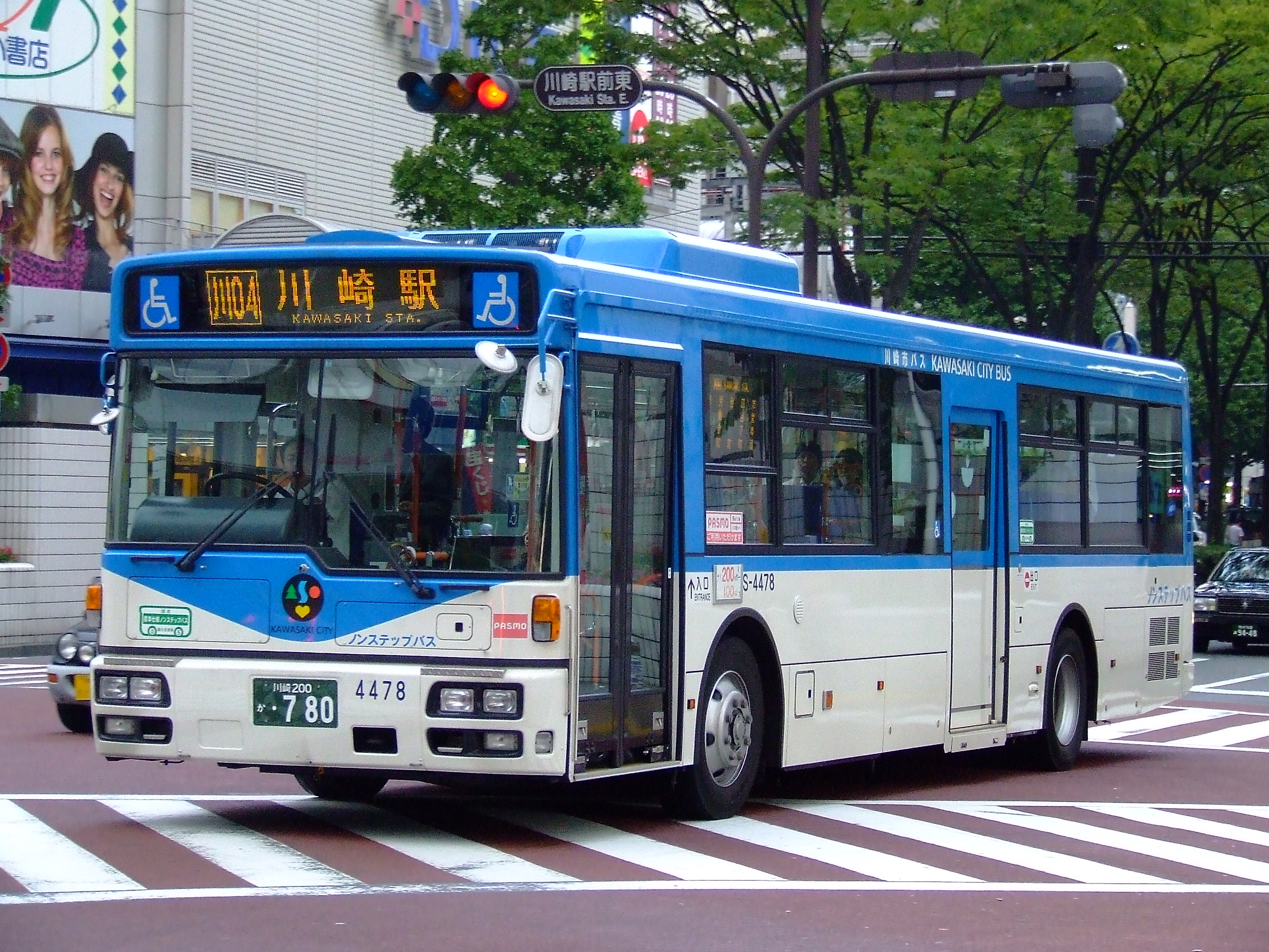 川崎市バス 塩浜営業所S4478号車 PKG-RA274PAN